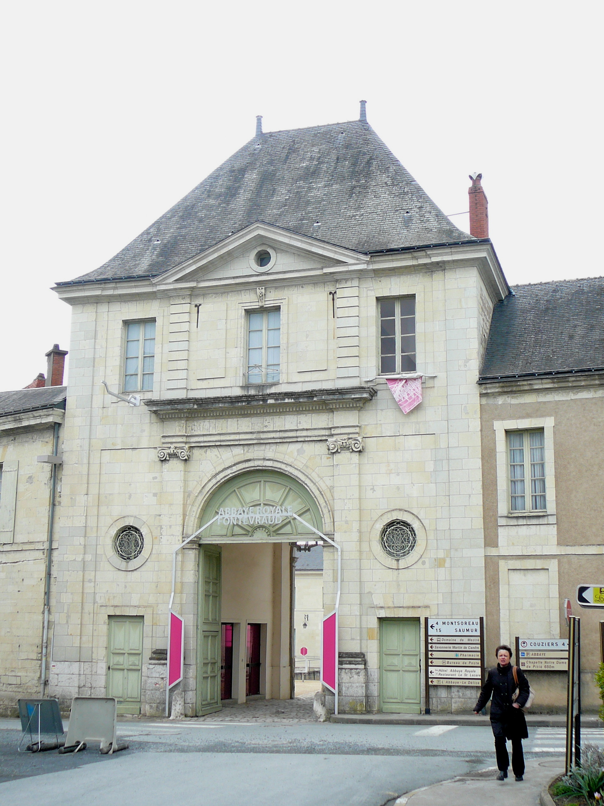 Accès à l'abbaye royale depuis la place des Plantagenêts